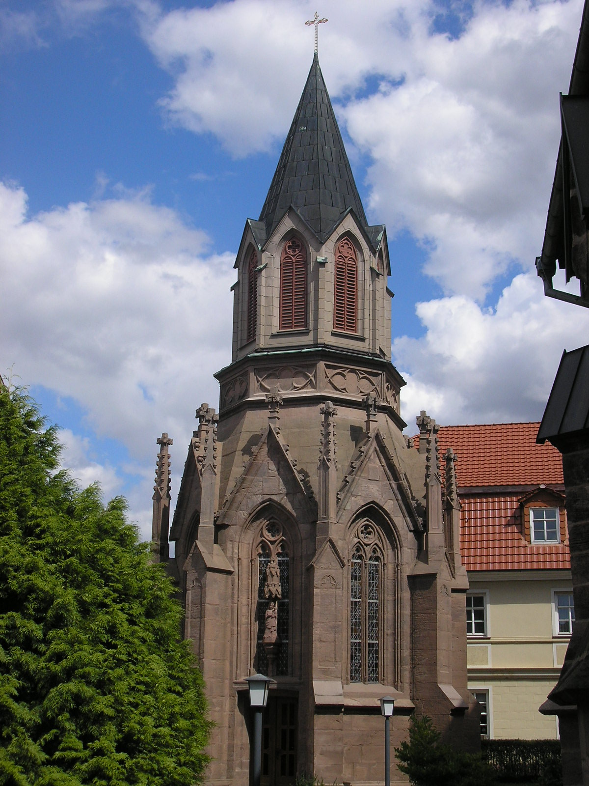 Die kleine Kapelle neben der Aegidienkirche in Heiligenstadt (Thüringen).